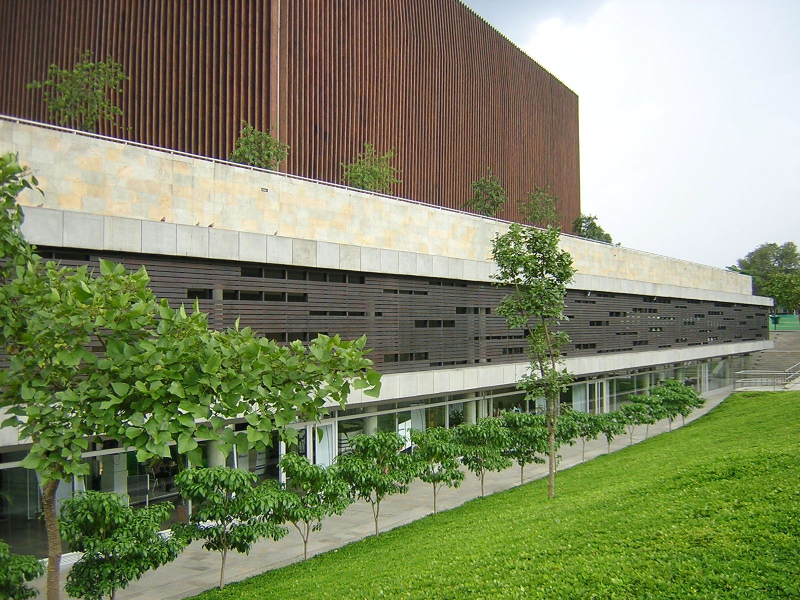 Centro Internacional de Convenciones y Exposiciones, Medellín, Colombia